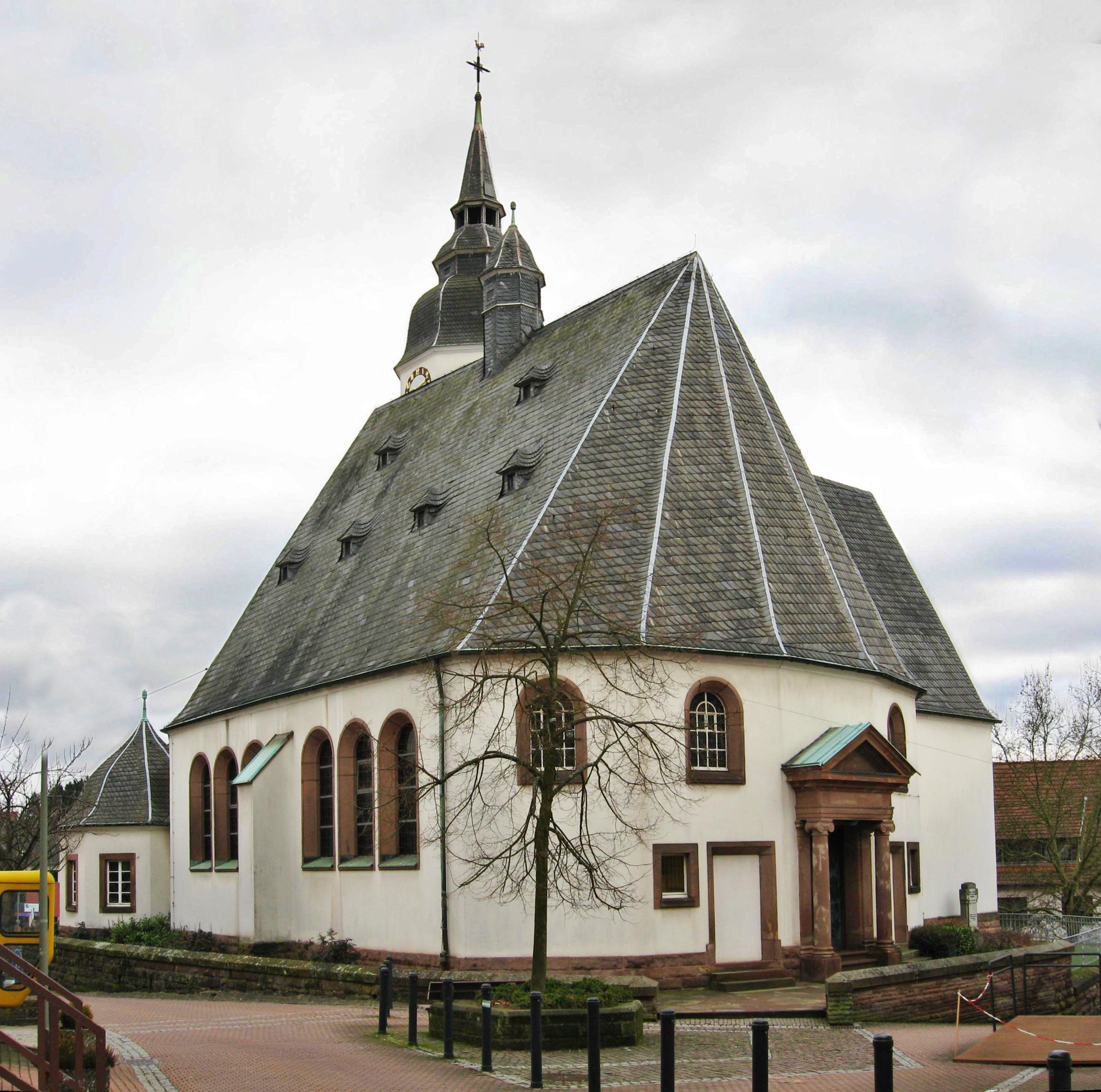 Barocke evangelische Kirche in Heusweiler. Früheste Zeugnisse stammen aus dem 12. Jahrhundert. Die Pfarrei "Husiler" wird 1330 erwähnt. Im Zuge der Reformation wurde die Kirche am 31.10.1575 lutherisch, dokumentiert im Pfarrregister von 1576. Von beiden Konfessionen wurde die Kirche ab 1685 bis zum Neubau der katholischen Kirche (1862) genutzt. Bei der Renovierung 1911 blieb der Chor aus dem 15. Jahrhundert erhalten. Das ursprüngliche barocke Kirchenschiff von 1719 wurde ersetzt. Sakristei und Turm wurden am Chor angefügt. Im klassizistischen Stil wurde der Kircheneingang gestaltet. Der Grabstein des den Neubau vorantreibenden Pfarrers Gustav Weber ist rechts vom Eingang angebracht.